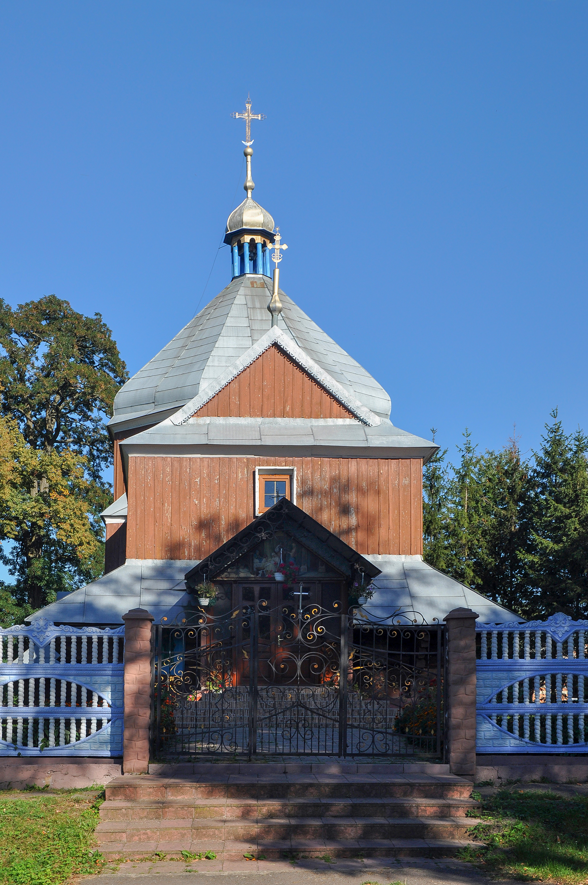 Церква Воскресіння Христового (дер.), с. Княгиничі